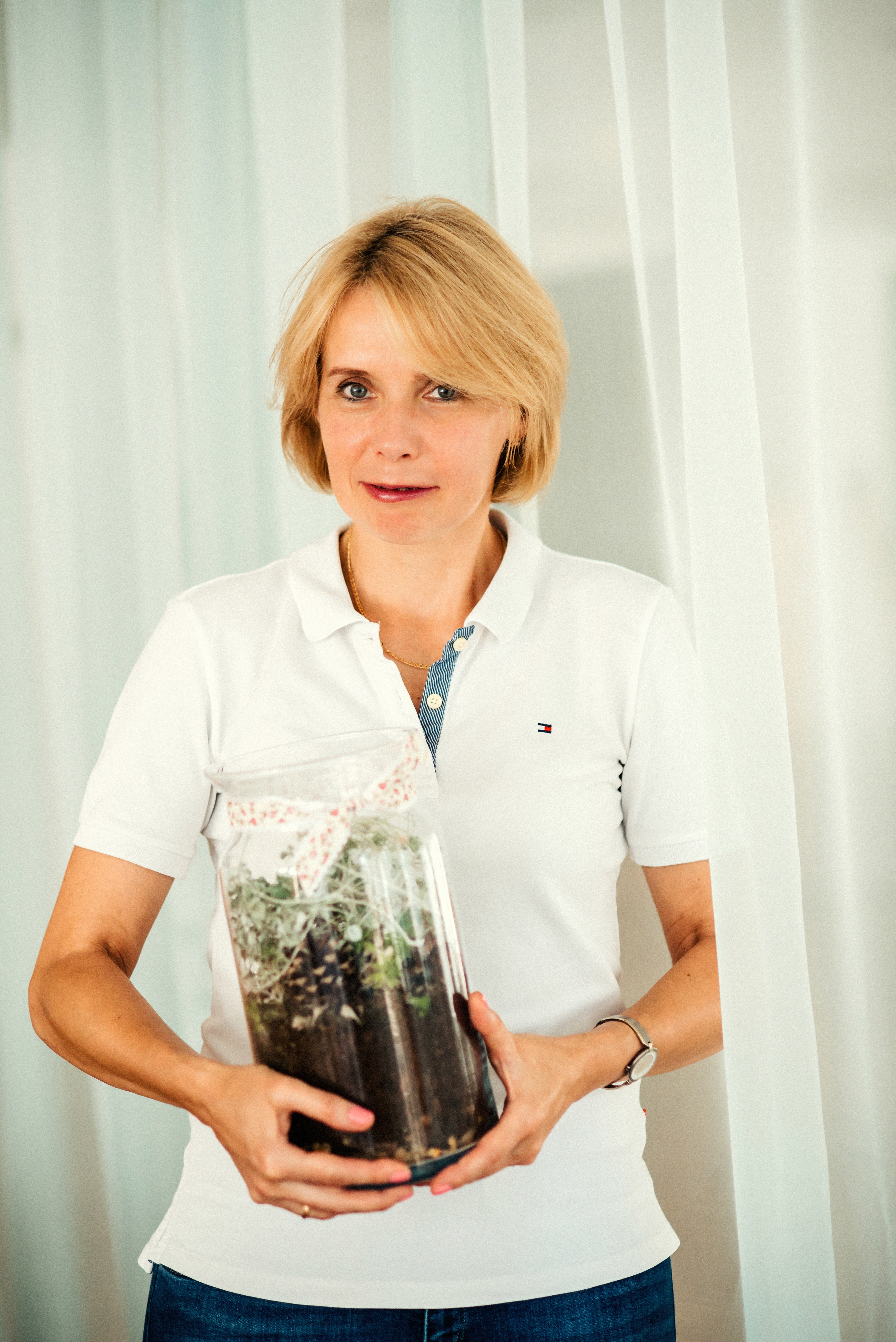 Фото Ягенської Галини Василівни - для освітнього проєкту "Educator"